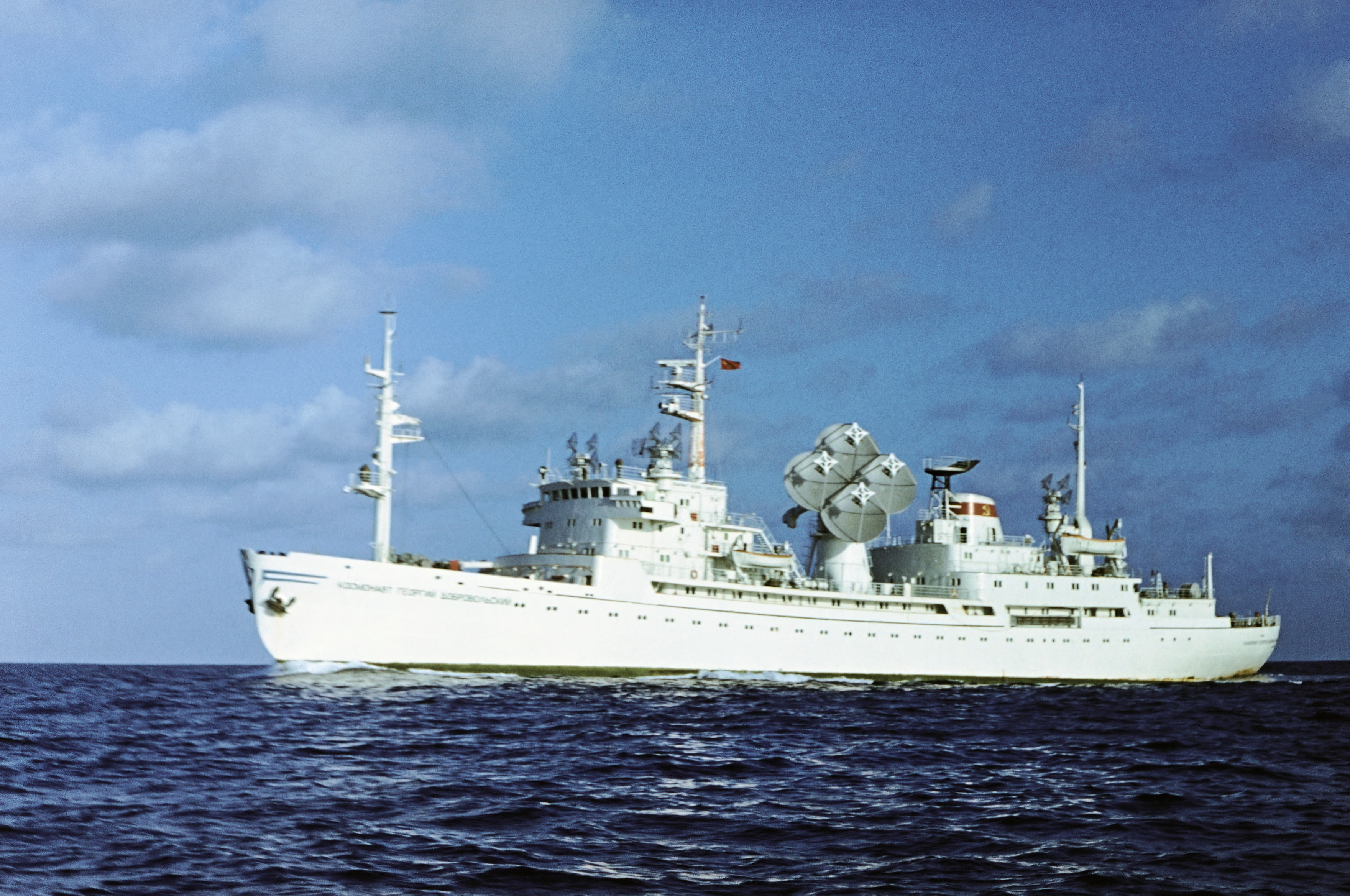 Научно-исследовательское судно СКИ ОМЭР АН СССР "Космонавт Георгий Добровольский"